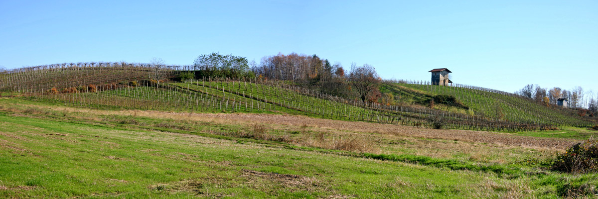 Panorama tardo autunnale delle colline novaresi, nei pressi di Suno (NO)